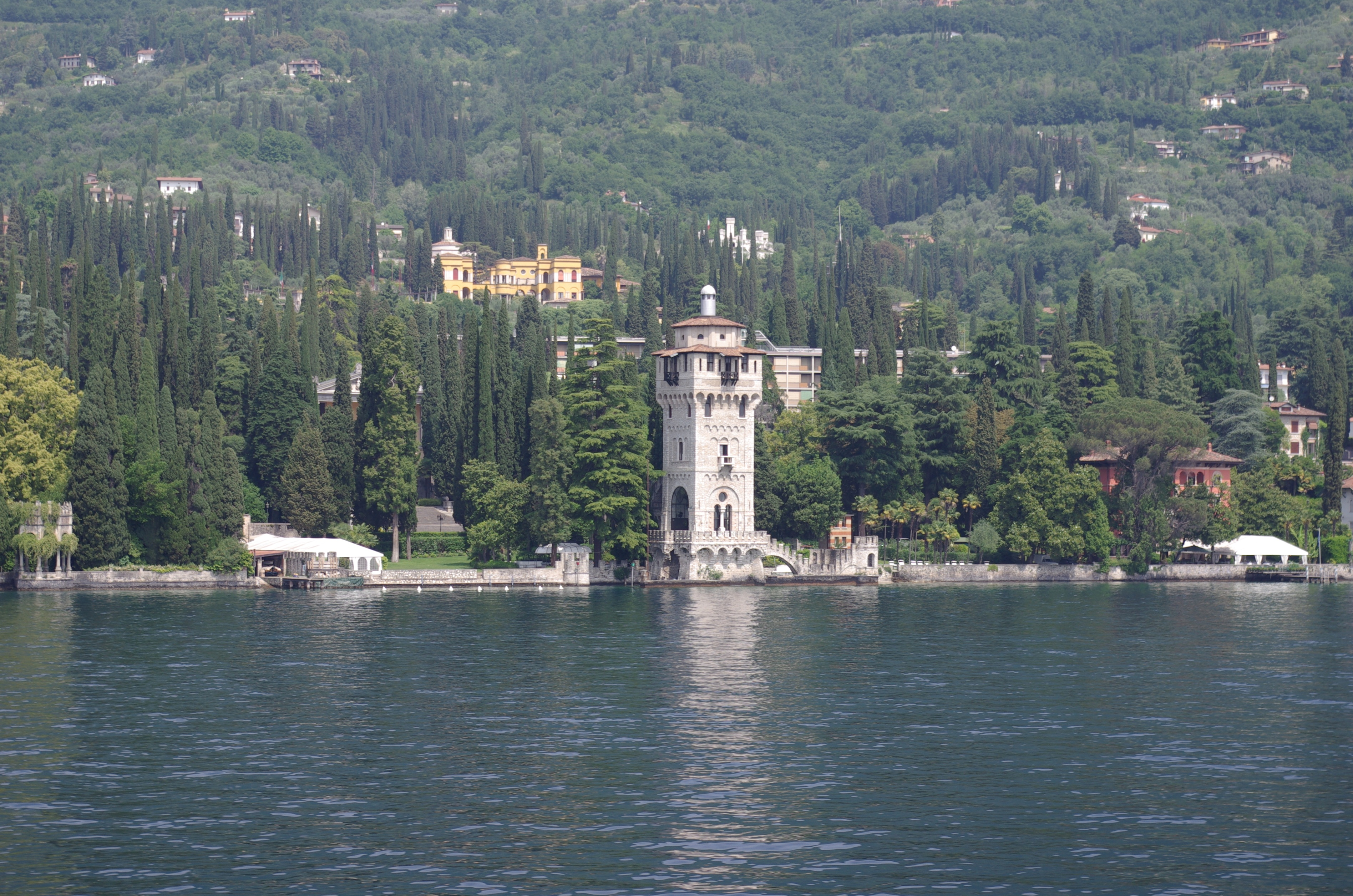 Blick vom Gardasee auf den Leuchtturm von Riviera, im Hintergrund der Vittoriale degli Italiani.